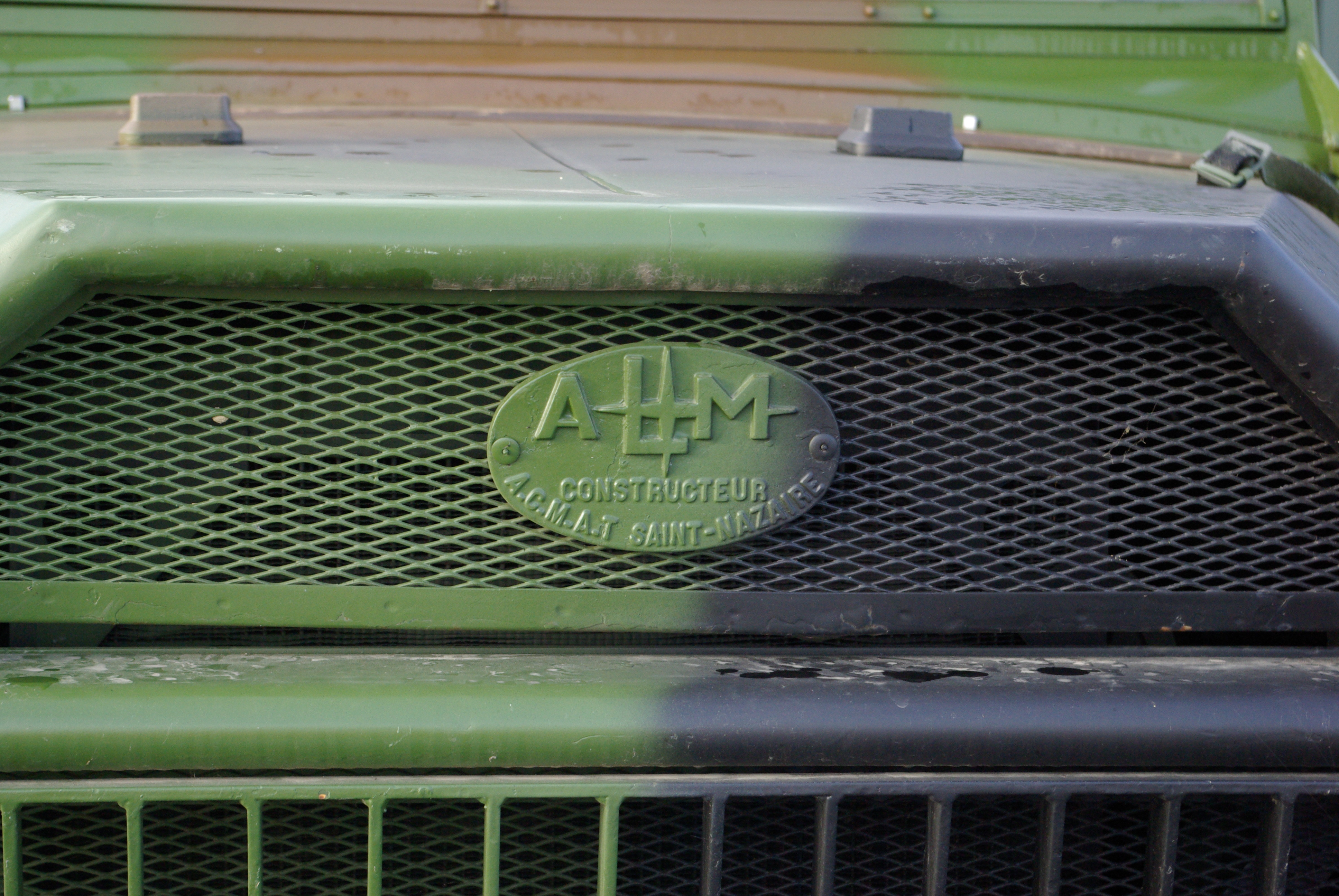 Logo de l'ALM - ACMAT sur la calandre d'un camion militaire.